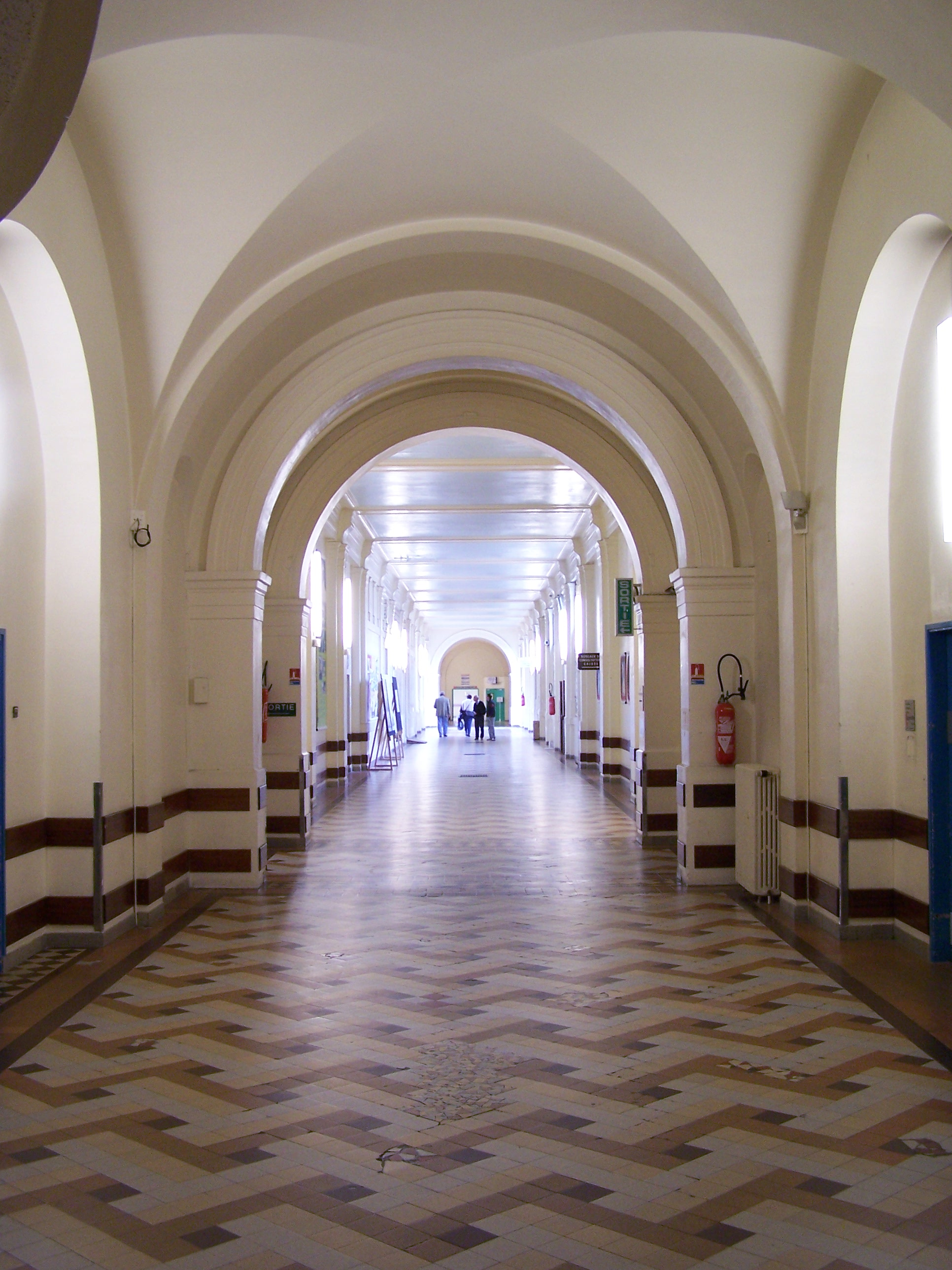 Hôpital (galerie) de Saint-Germain-en-Laye (Yvelines, France)